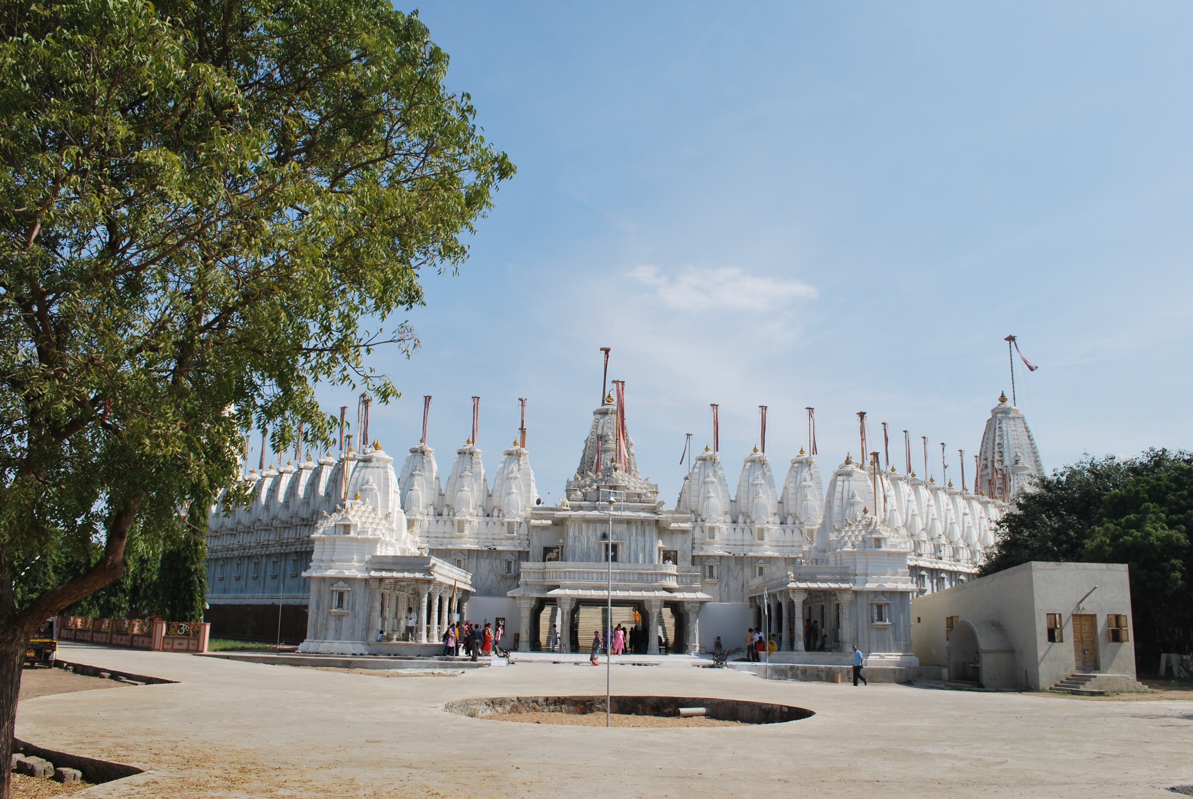 Bonter Jinalaya, Koday, Kachchh